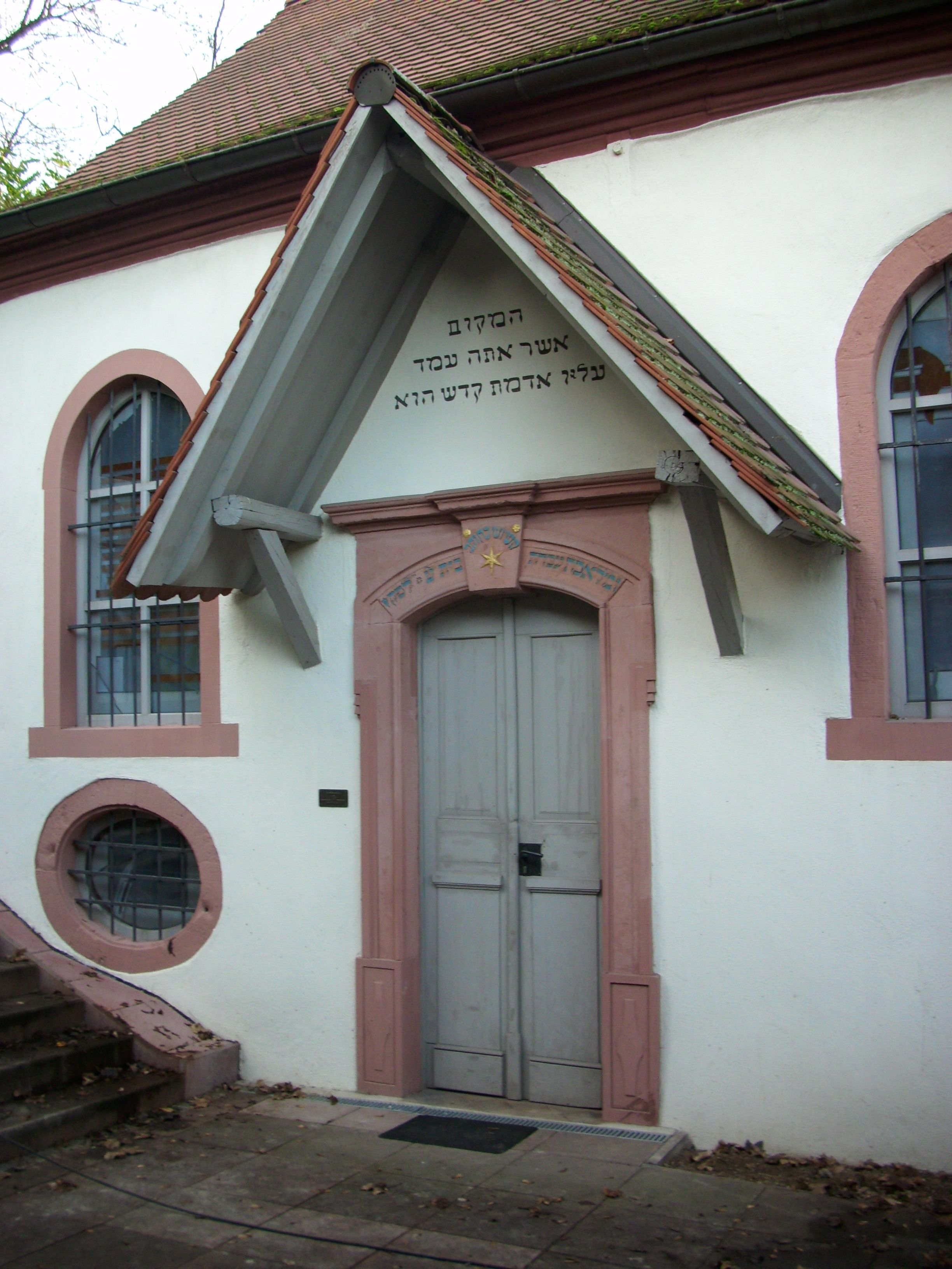 Kleiner Putzbau, Fachwerkgiebel, Krüppelwalmdach, mit Hochzeitsstein, 1736/37; Mikwen aus dem 18. und 19. Jahrhundert